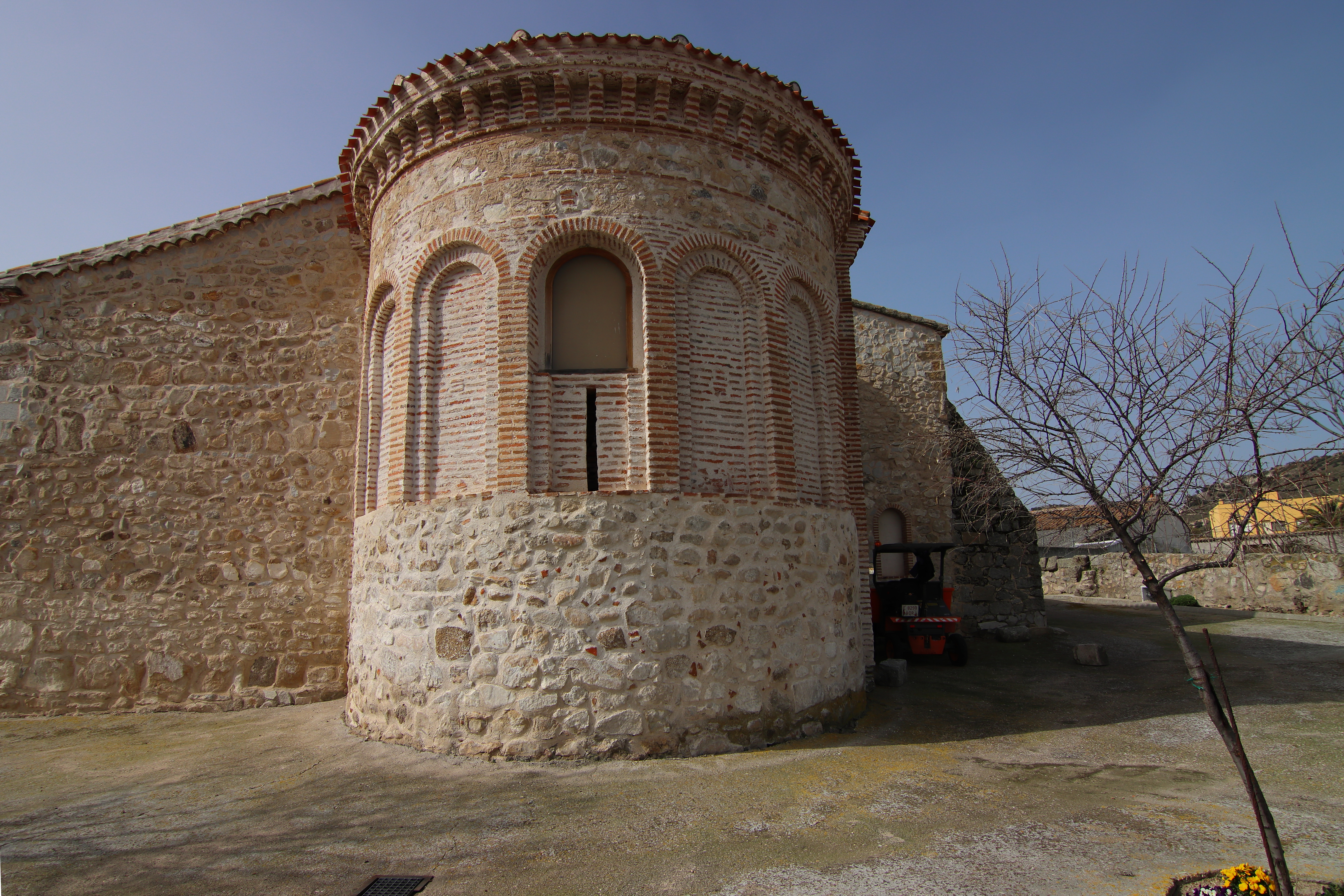 Iglesia de San Vicente Mártir, Paredes de Escalona, ábside, 02